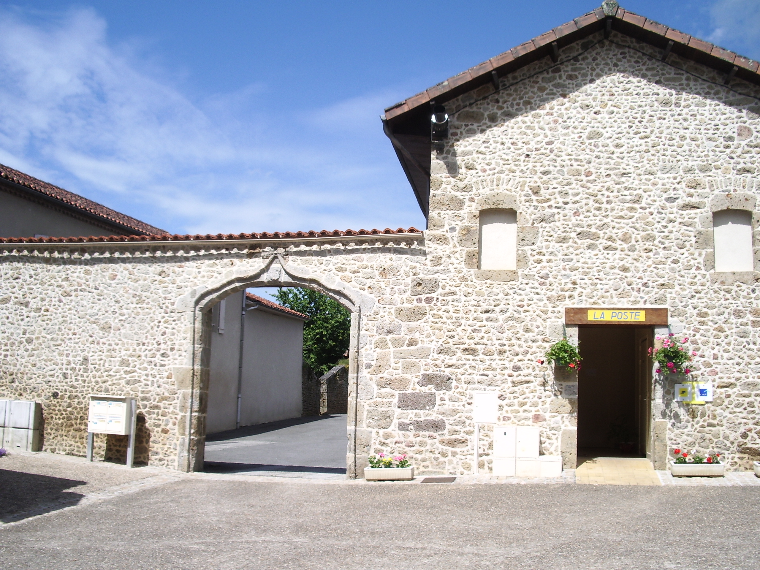 Portail du presbytère de Pressignac (Charente, France)